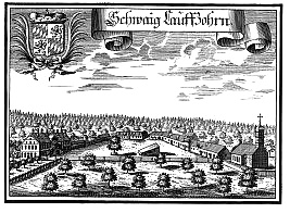 Stich um 1710, Schloss Laufzorn, Oberhaching